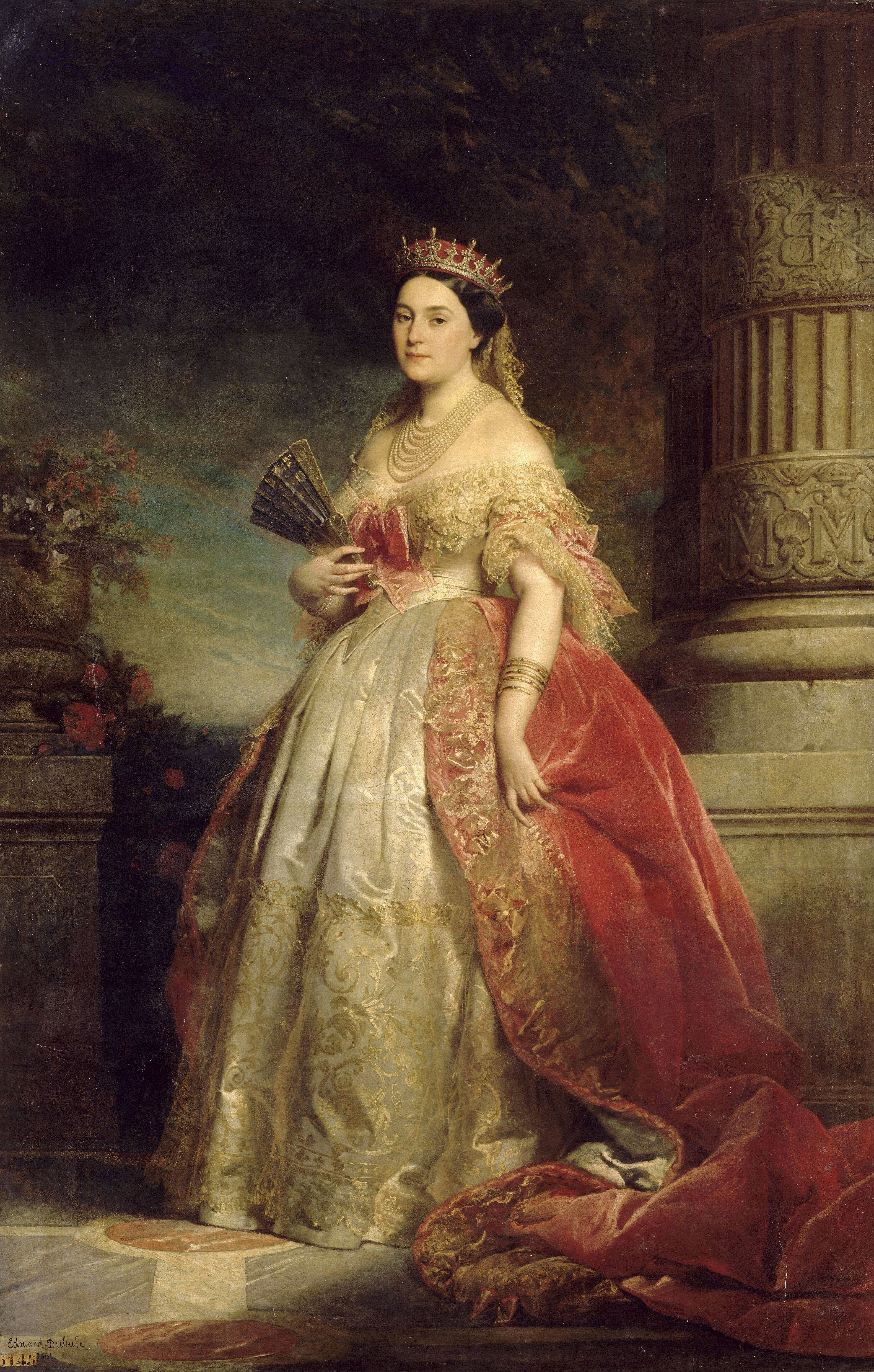 Portrait of Mathilde Bonaparte (1820-1904)